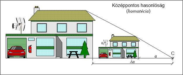 Geometriai transzformáció 2D-ben: középpontos hasonlóság (homotécia)